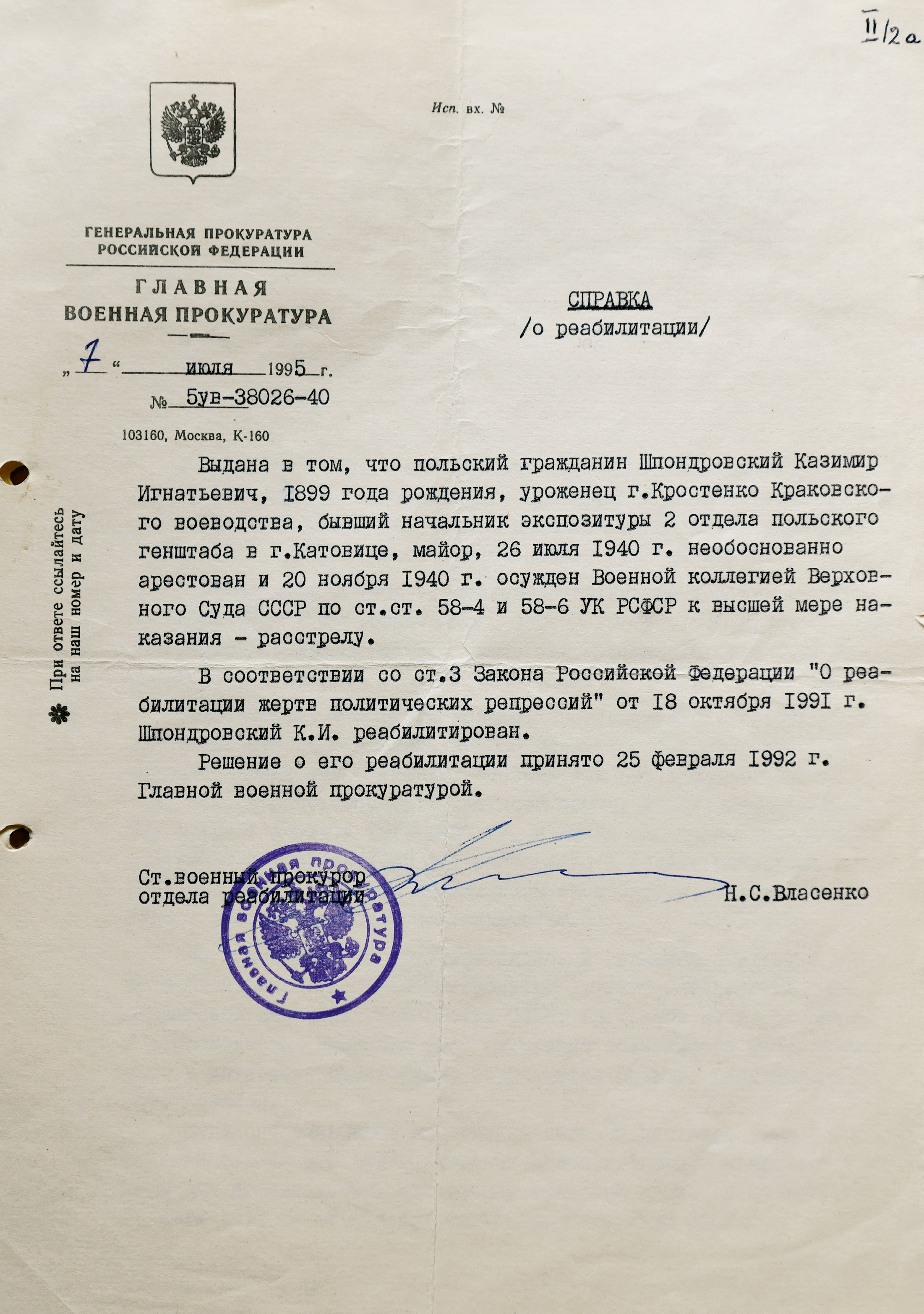 „Poświadczenie o rehabilitacji” mjr dypl. Kazimierza Szpądrowskiego zgodnie z ustawą „O rehabilitacji ofiar represji politycznych” z Generalnej Prokuratury Federacji Rosyjskiej-Główna Prokuratura Wojskowa w Moskwie z dnia 7.07.1995 nr 5 UW-38026-40.